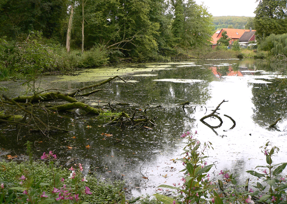 Teich im Park von Schloss Wrisbergholzen